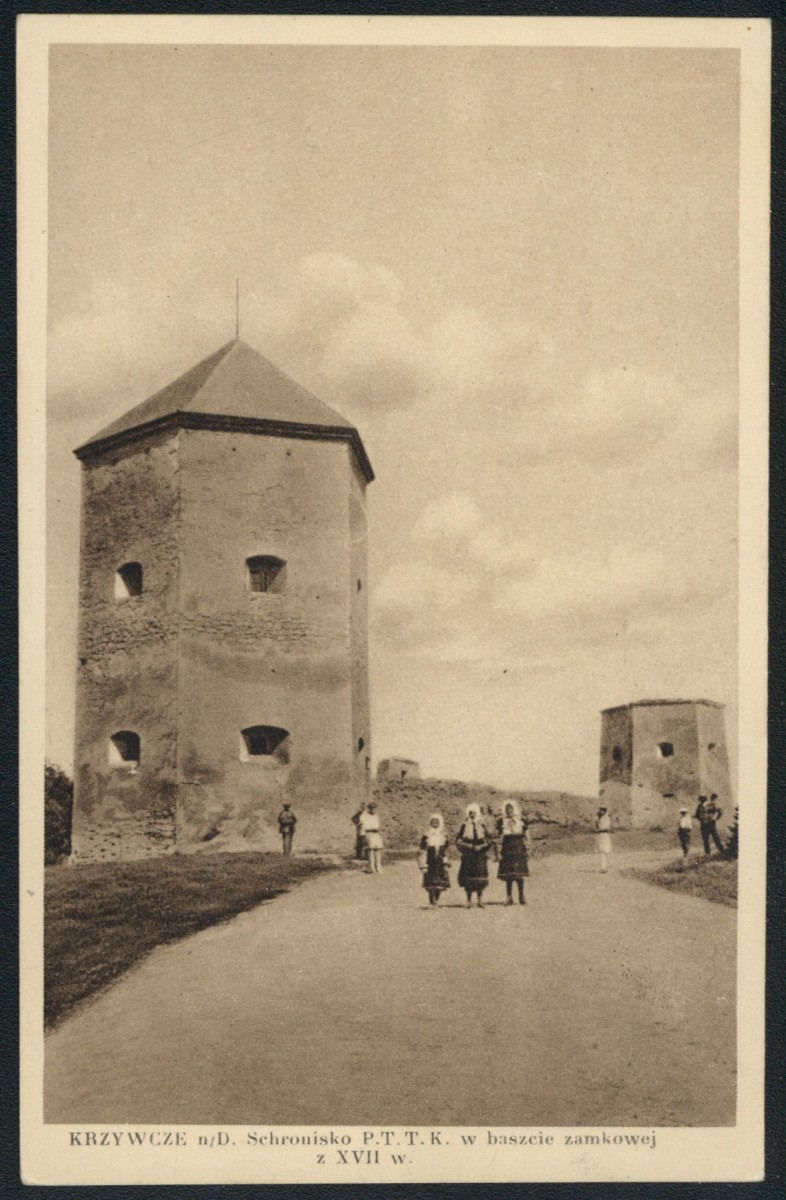 Залишки фортеці в селі Кривче Борщівського району Тернопільської області